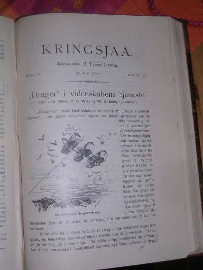 Kringsjaa. Avfotografert framsideblad frå eit Kringsjaa, januar 1897. Redigert av Hans Tambs Lyche (1859-1898).